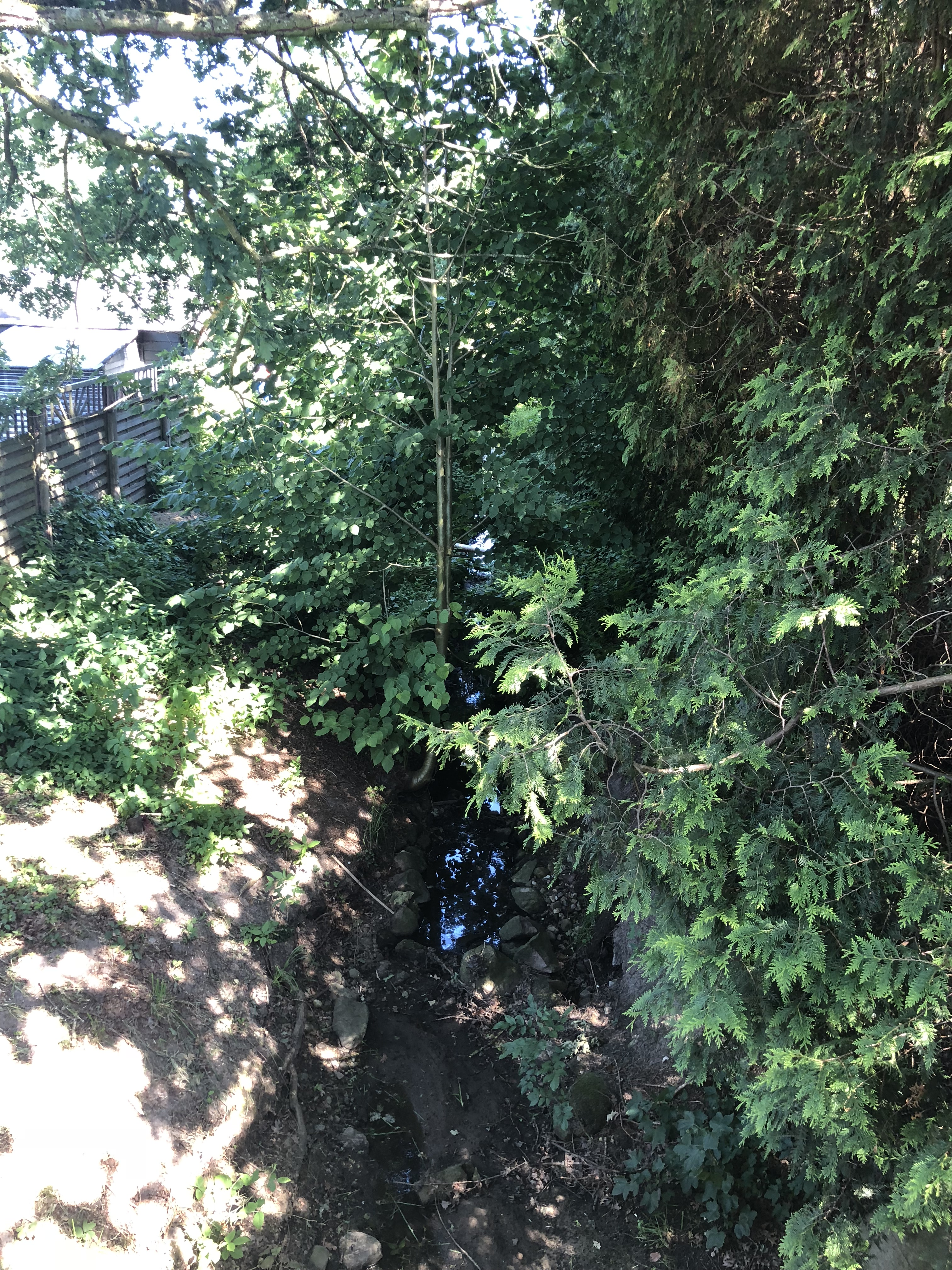 Guldbeek in Beekdörp an de Landsstraat 130